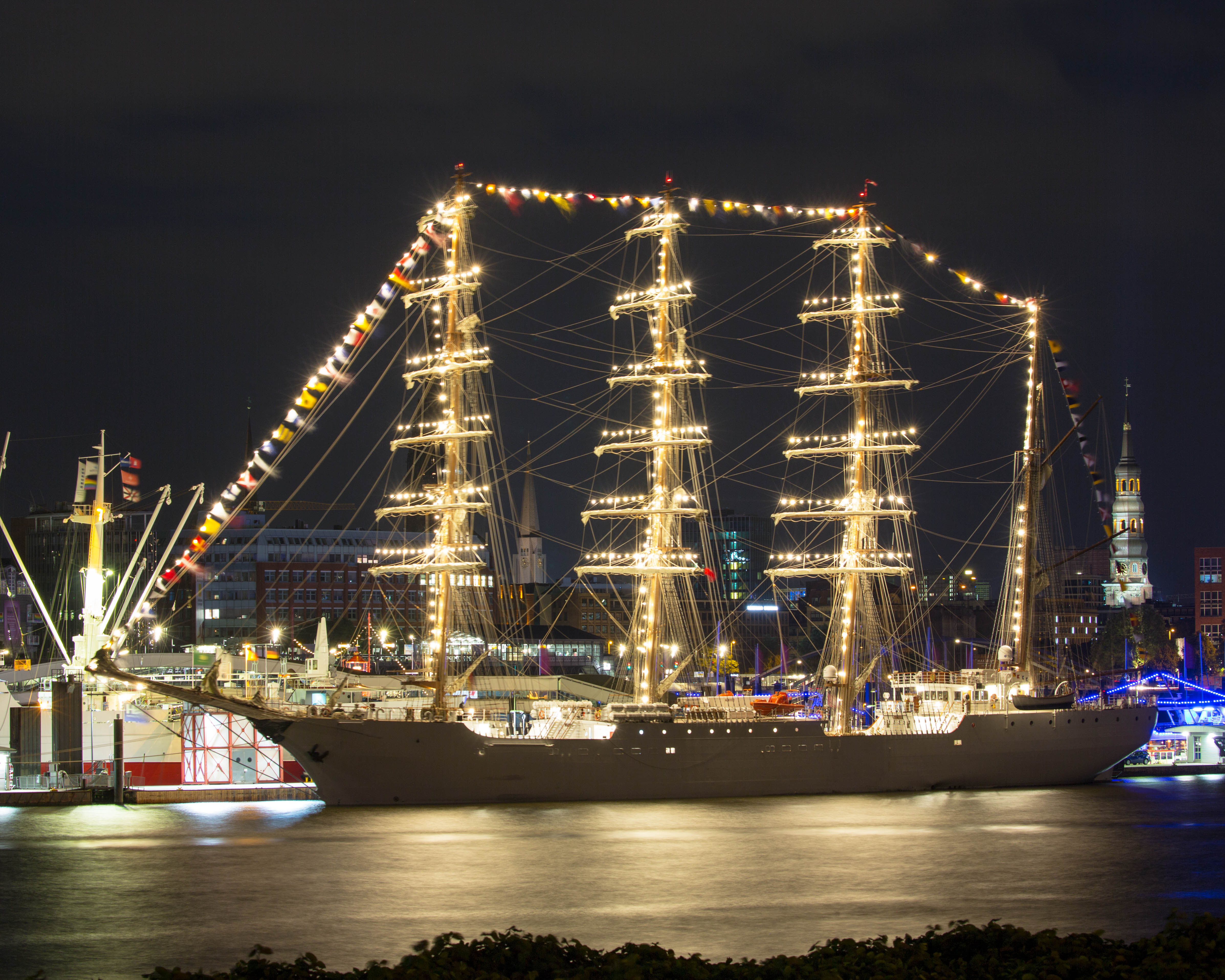 Die BAP Unión am 05. August 2017 an der Hamburger Überseebrücke / Germany